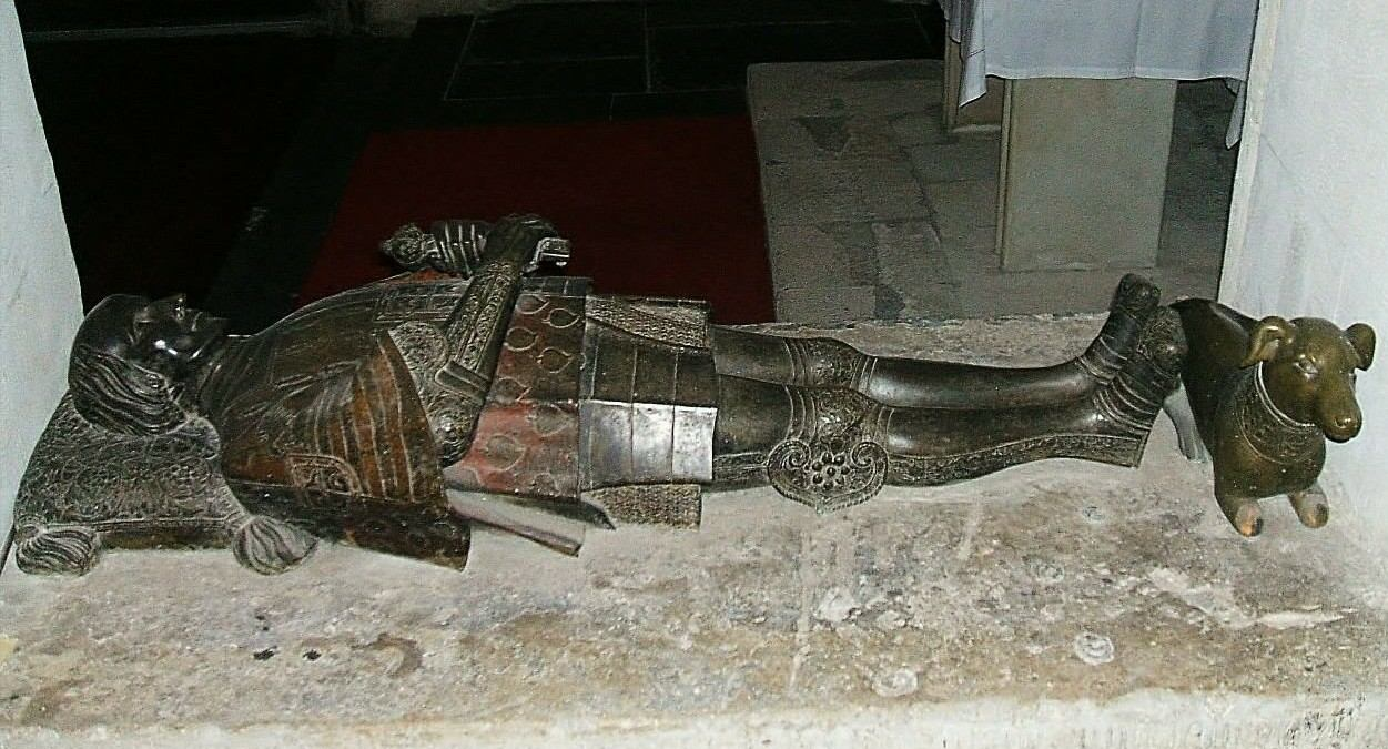 Sepulcro de Don Pedro Martínez de Álava, iglesia de San Pedro Apóstol, Vitoria-Gasteiz